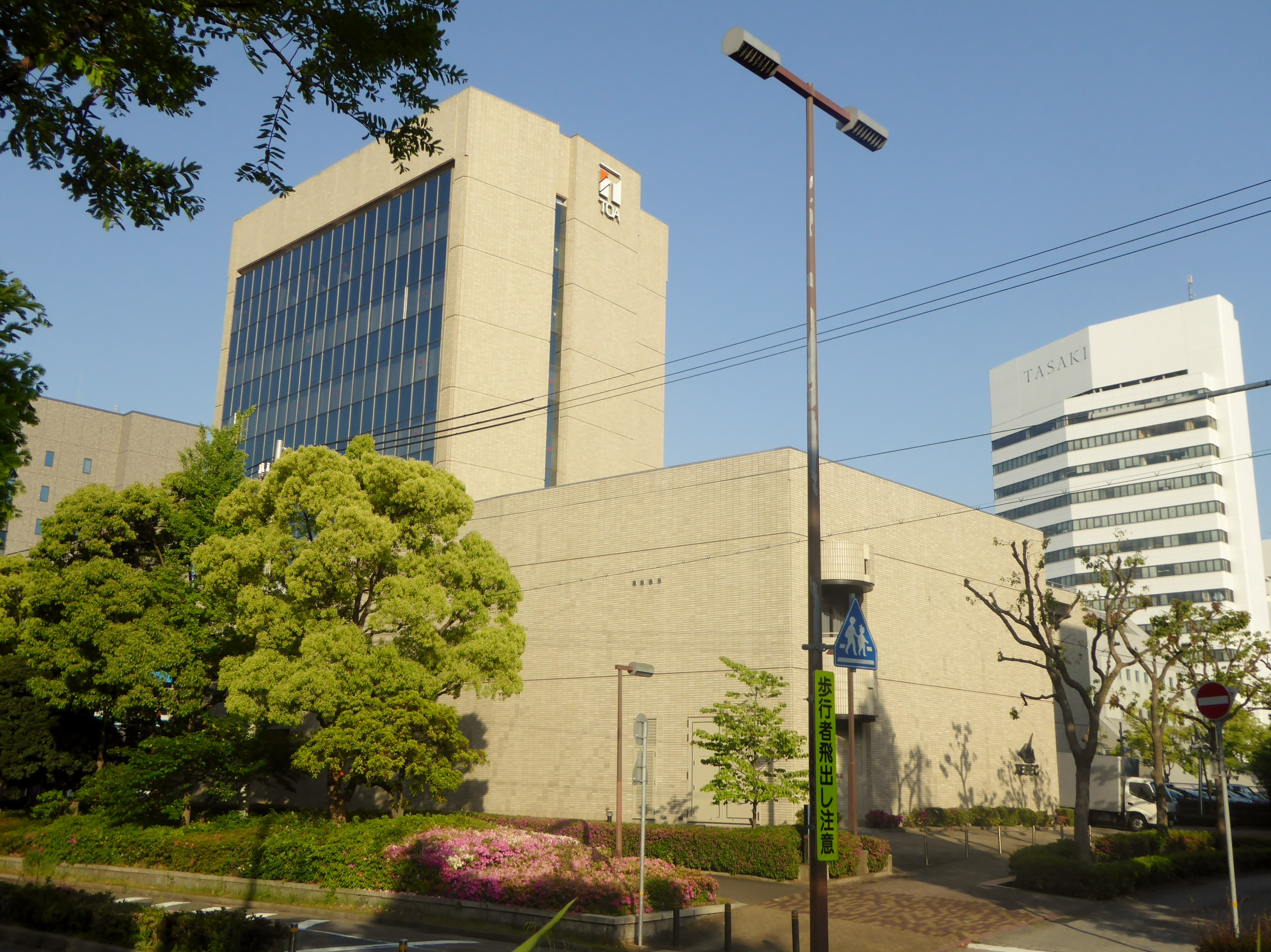 TOA株式会社本社を撮影。